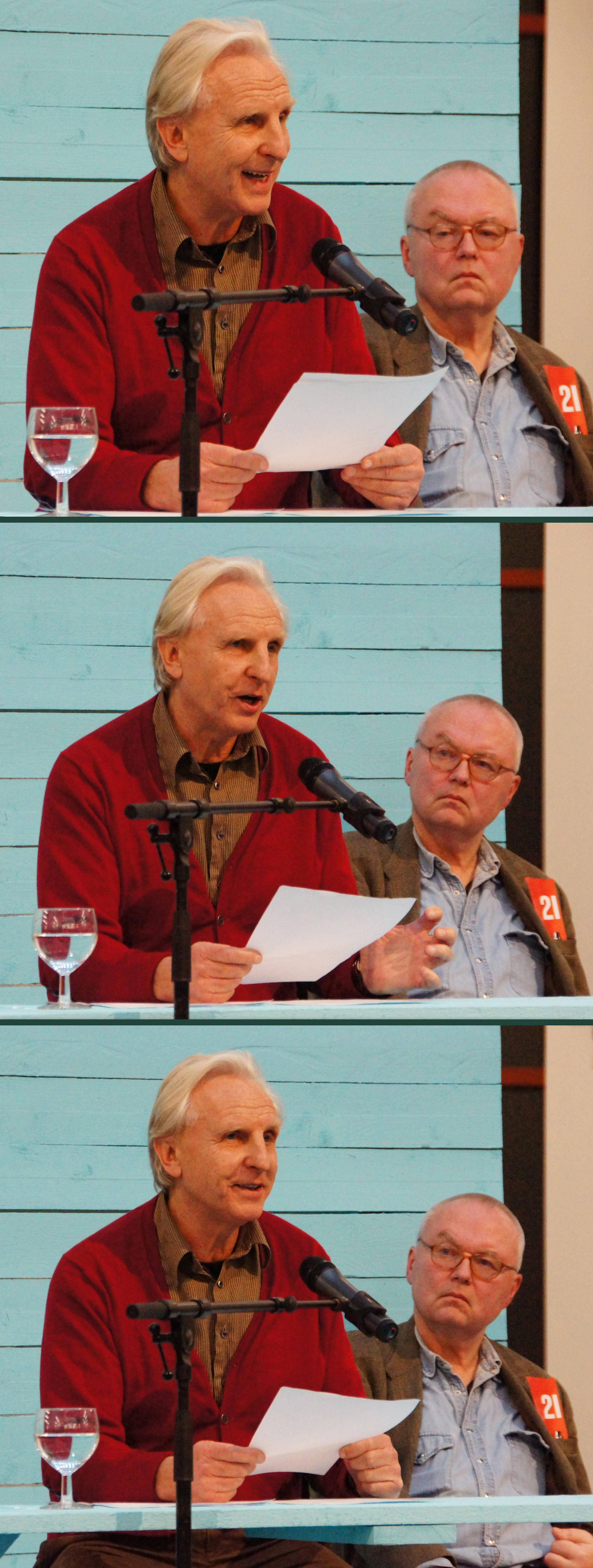 Unter dem Titel "Eine Versammlung kommt selten allein" lasen, anlässlich des 40. Jahrestages der Gründung, Lyriker und Lyrikerinnen der Grazer Autorinnen Autorenversammlung im "Salon für Kunstbuch im 21er Haus". Abgebildete Personen: S. Dateiname.